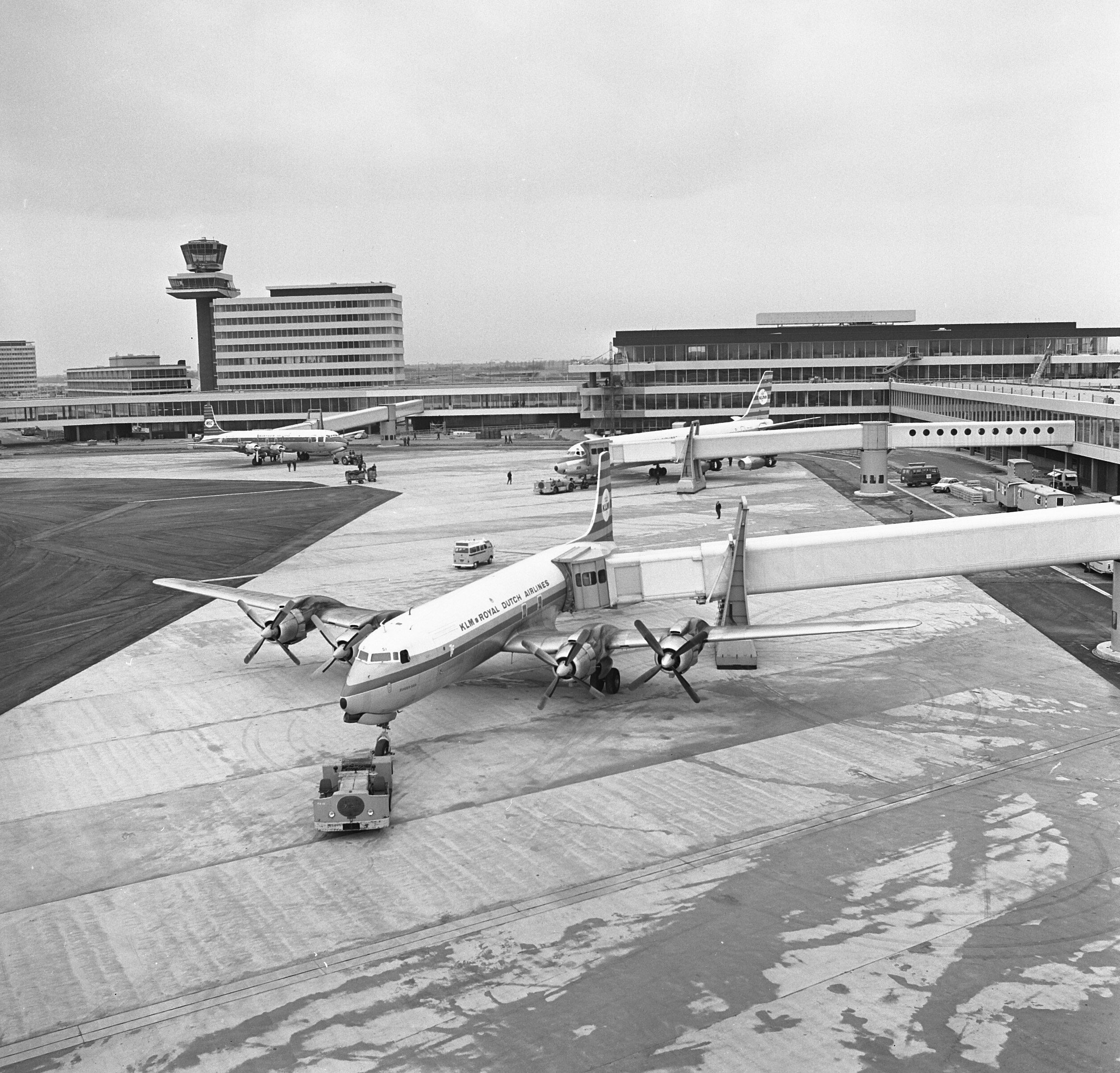 Collectie / Archief : Fotocollectie Anefo Reportage / Serie : [ onbekend ] Beschrijving : Luchtareaal Schiphol Datum : 24 maart 1967 Locatie : Noord-Holland, Schiphol Trefwoorden : vliegvelden Fotograaf : Fotograaf Onbekend / Anefo Auteursrechthebbende : Nationaal Archief Materiaalsoort : Negatief (zwart/wit) Nummer archiefinventaris : bekijk toegang 2.24.01.03 Bestanddeelnummer : 920-1819